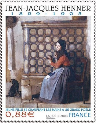 Timbre reprenant une oeuvre de Jean-Jacques Henner